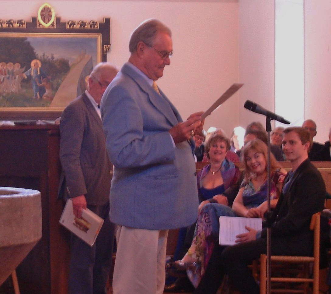 Prinsgemalen læste egne digte på fransk i Østermarie Kirke. Bag ham digteren Peter Poulsen, der har oversat dem til dansk. På bænken operasangerne Gitta Maria Sjøberg (der sang digtene på fransk) og Ingeborg Børch samt pianisten Kristoffer Hyldig